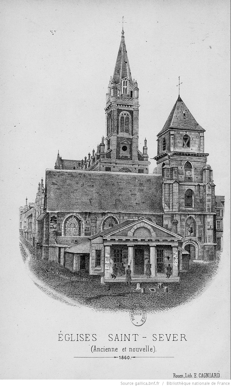 Eglise Saint-Sever (ancienne et nouvelle)